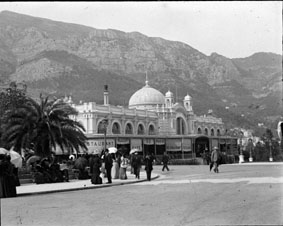 Fonds Trutat - Photographie ancienne Cote : TRU C 1811 Localisation : Fonds ancien (S 30) Original non communicable Titre : Café de Paris, Monte-Carlo, avril 1899 Auteur : Trutat, Eugène Rôle de l’auteur : Photographe Lieu de création : Monte-Carlo (Monaco) Date de création : 1899 Mesures : : 5 x 6 cm Observations : Note manuscrite de Trutat : " Monte-Carlo, avril 1899 ". Mot(s)-clé(s) : -- Café -- Montagne -- Architecture -- Bâtiment -- Palmier -- Groupe -- Rue -- Monte-Carlo (Monaco) -- Monaco (Principauté de) -- Café de Paris (Monte-Carlo) -- 19e siècle, 4e quart Médium : Photographies -- Négatifs sur plaque de verre -- Noir et blanc -- Scènes de rue -- Vues d'architecture Bibliothèque de Toulouse. Domaine public